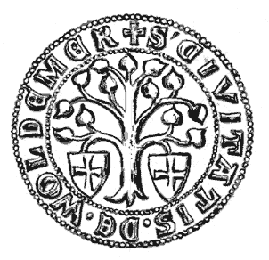 Volmari orduaegne vapp 1524. aastast. Rootsi ajal lisati vapile Oxienstierna härjapea.